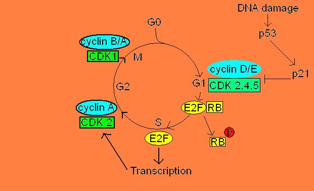 cycle cellulaire montrant les diverses kinases impliquées dans la phosphorylation de pRB